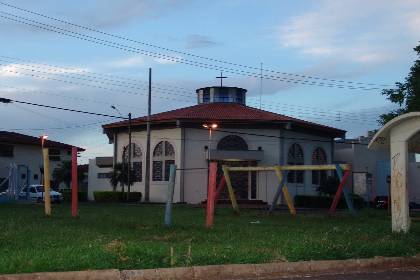 Imagens do município de Bariri, estado de São Paulo, Brasil.